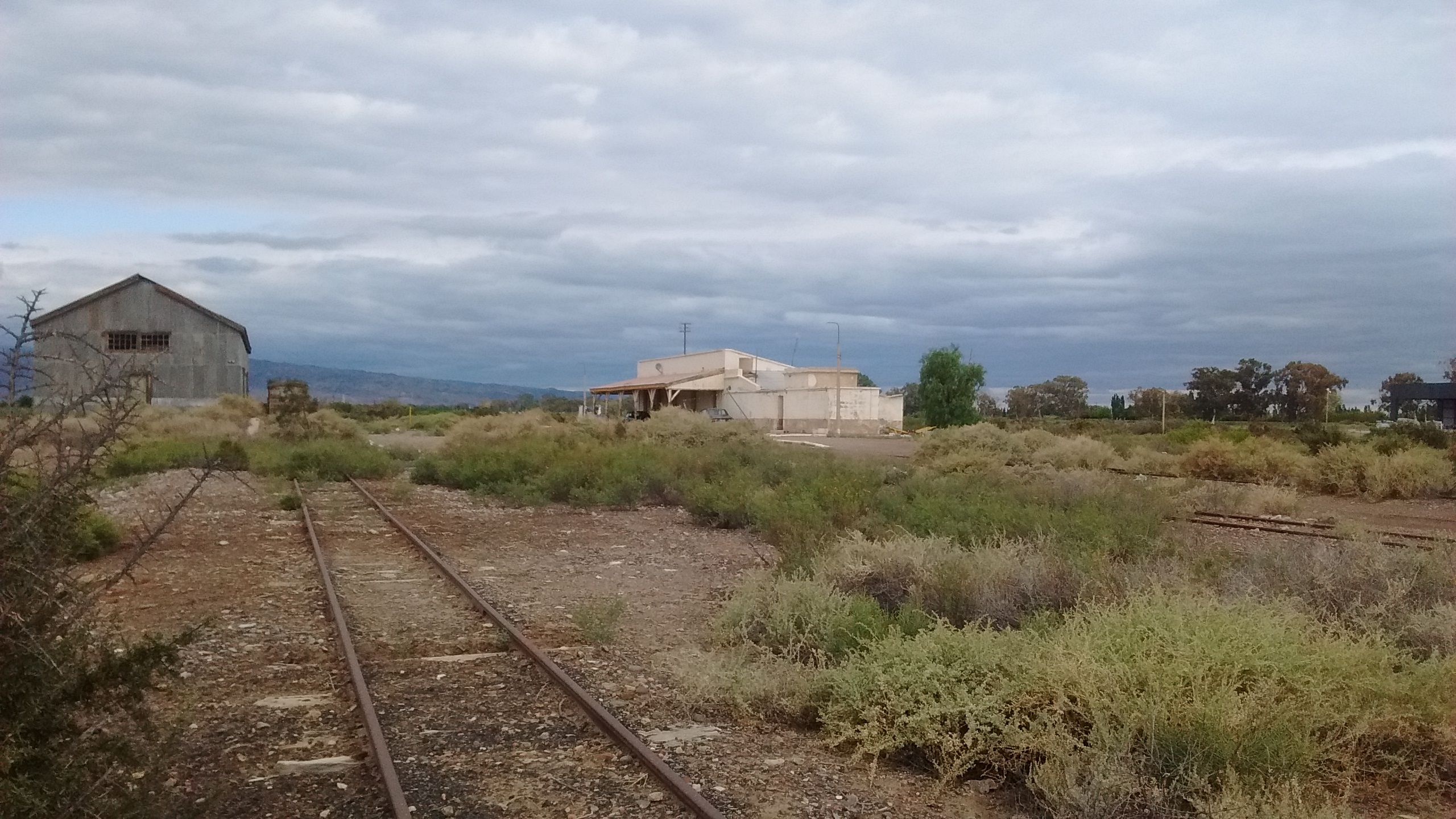 Estación Coll vista desde el costado